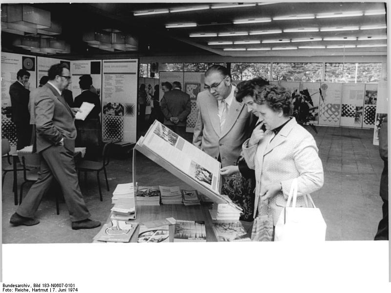 Erfurt, 15. Arbeiterfestspiele, Ausstellung ADN-ZB Reiche 7.6.74 Erfurt: 15. Arbeiterfestspiele - In der Konsultationsstelle für Kulturarbeit auf dem iga-Gelände können sich die Festspielgäste u.a. über das kulturelle Schaffen der Betriebe im Bezirk Erfurt informieren.